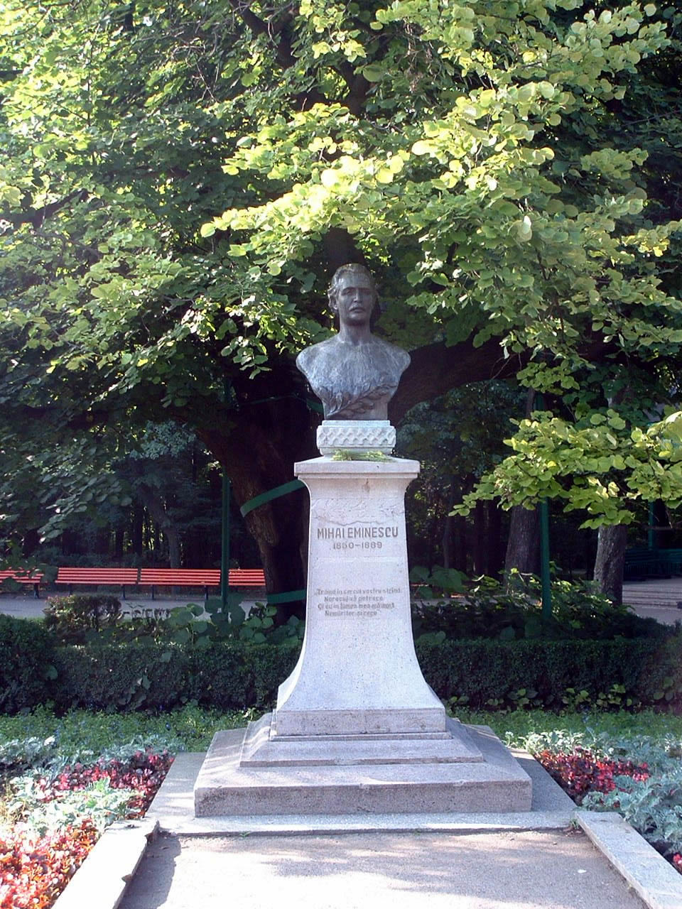 Bustul lui Eminescu din parcul Copou, Iaşi